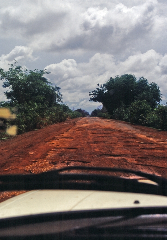 Die Süduferstraße Richtung Georgetown, von Straße kann man kaum noch reden, es sind nur noch Löcher vorhanden die von Asphaltstreifen zusammen gehalten werden; in der Nähe von Soma